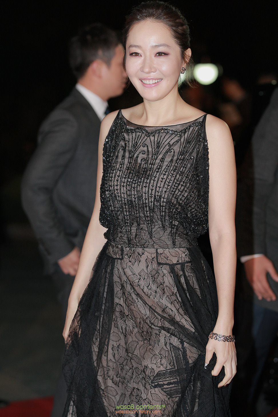 2013년 11월 22일 서울 경희대학교 평화의전당에서 열린 제34회 청룡영화상 시상식에 레드카펫을 밟고 입장하는 엄지원.